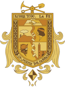 Escudo de Hidalgo del Parral. En su parte superior, se dibujan los instrumentos de trabajo del minero y el lema de los parralenses: SOBRE TODO, LA FE; bajo éste, dos manos entrelazadas. El escudo se divide en cuatro secciones, definidas por una línea horizontal que se cruza en su centro con el río Parral, el cual serpentea por la ciudad. En las secciones superiores la cabeza de un tarahumara tocado con collera y visto de perfil y el cerro de la mina La Prieta. En las inferiores el templo de San José y la cabeza de un español, igualmente de perfil. Sobre el margen aparecen unas hojas de vid y un racimo de uvas en los lados derecho e izquierdo, y en la parte inferior el primer nombre de la localidad, SN. JOSEPH DEL PARRAL.